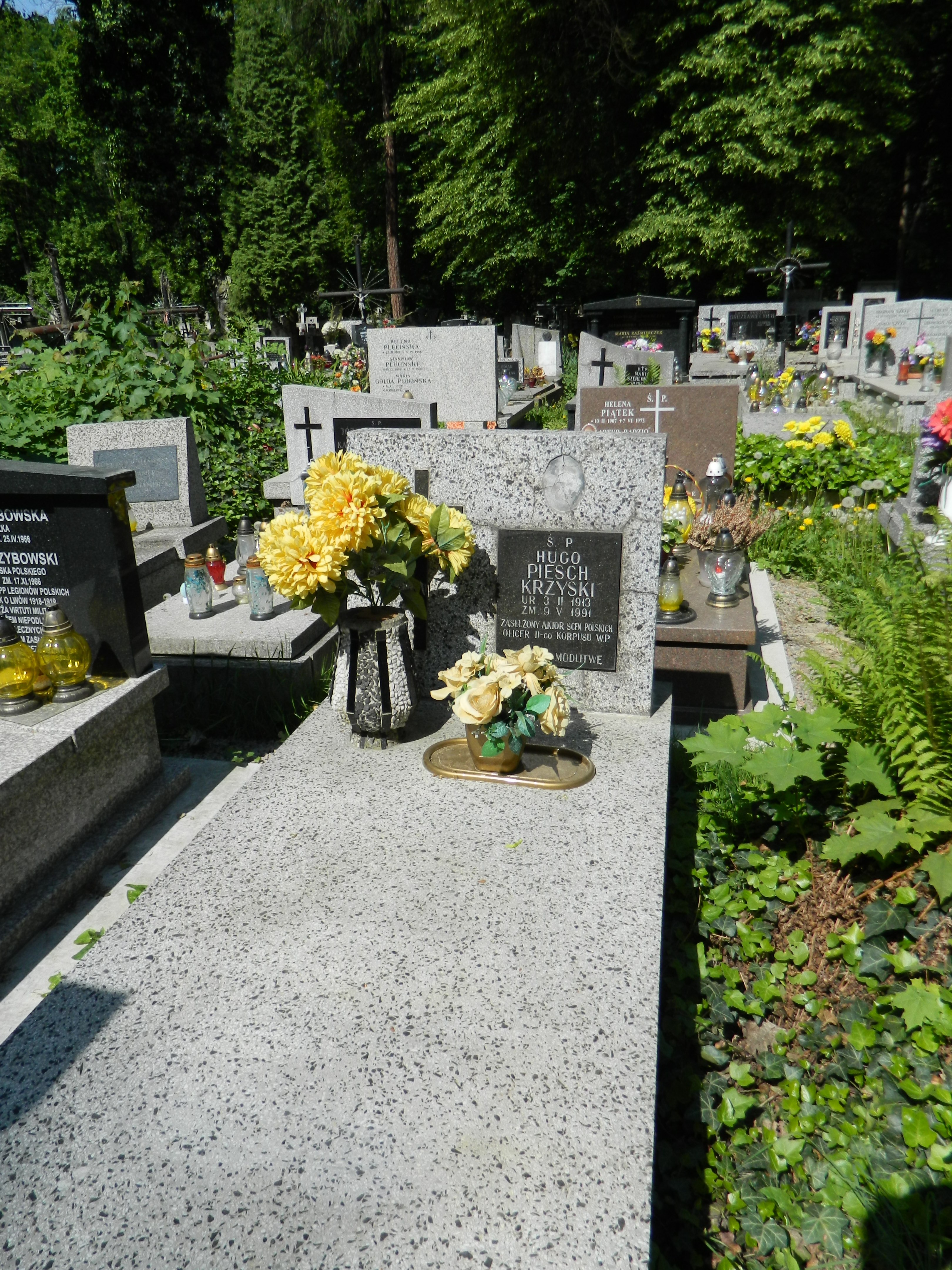 Grób Hugo Krzyskiego (Piescha) na Cmentarzu Rakowickim w Krakowie (kwatera XIVa, rząd 23, miejsce 21)